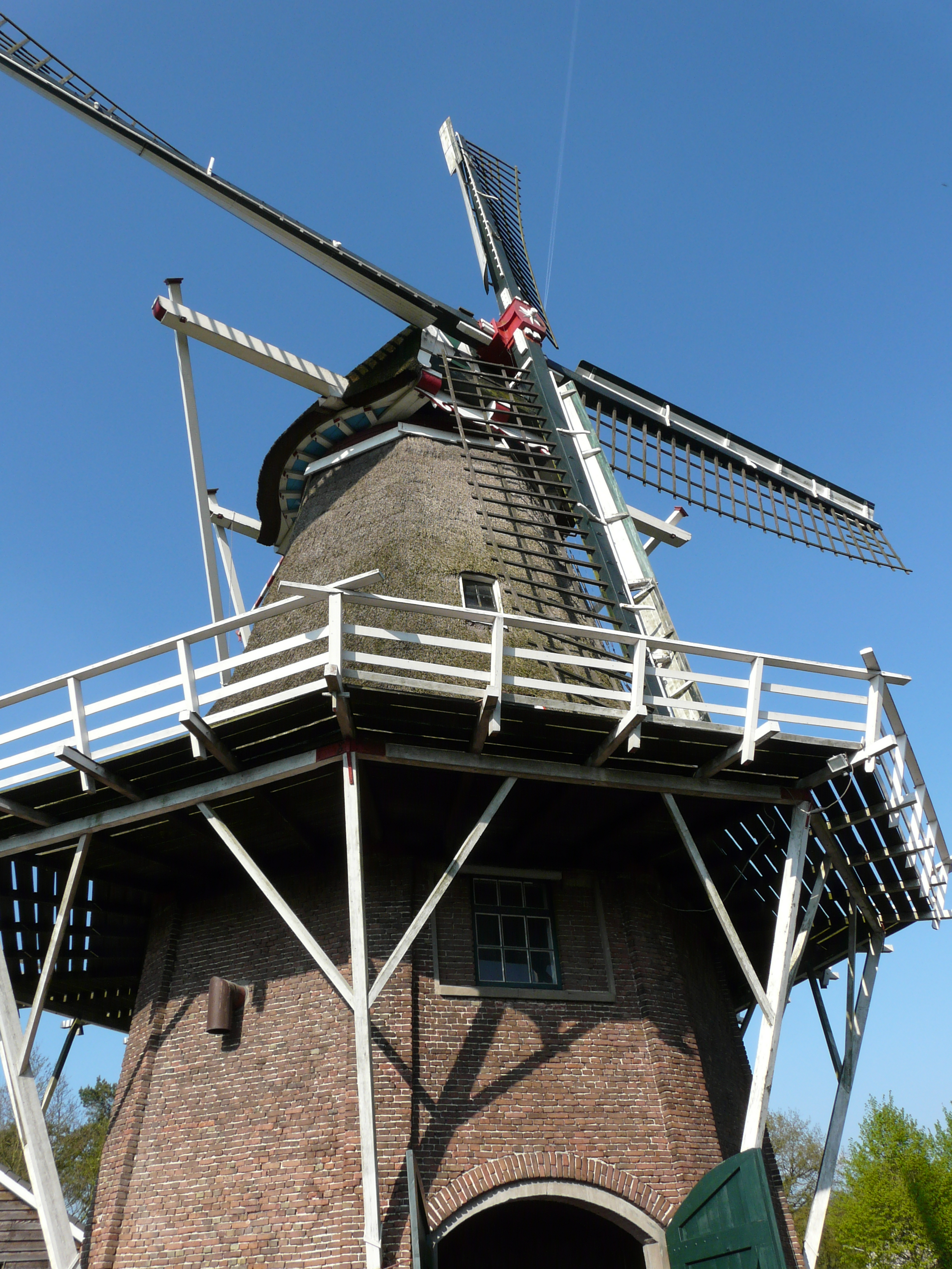 Korenmolen van Havelte in Havelte